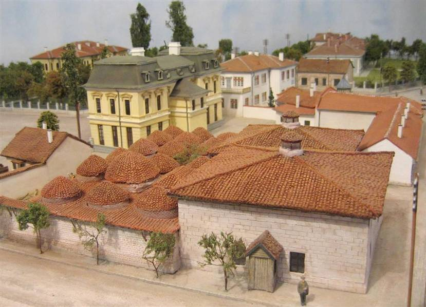 Османската баня в Разград